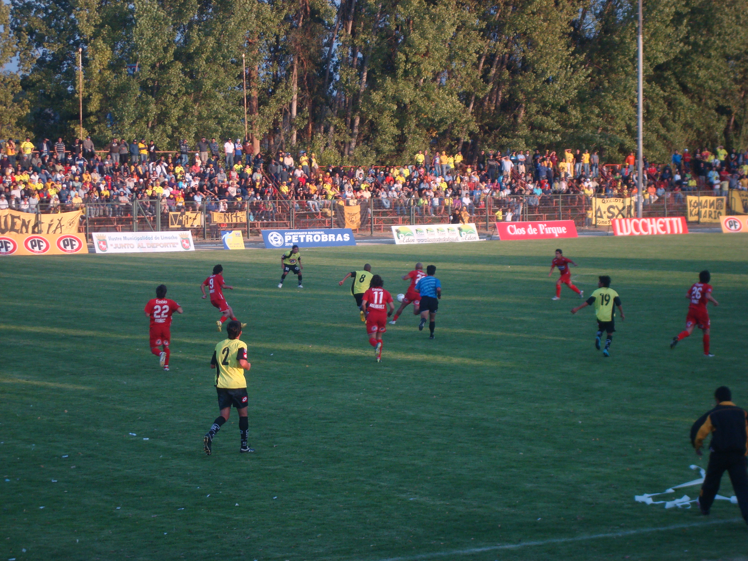 San Luis - Ñublense marzo de 2010, Municipal de Limache